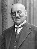 Title: Gustav Boss (cropped) People in the image: Böss, Gustav: Oberbürgermeister von Berlin, Deutschland Factual corrections and alternative descriptions are encouraged separately from the original description. Additionally errors can be reported at this page to inform the Bundesarchiv. Original historic description: Der grosse freundliche Empfang des ersten Wiener Bürgermeisters Seitz durch den Berliner Oberbürgermeisters Boess im Berliner Rathaus! Der Berliner Oberbürgermeister Boess Arm in Arm mit dem ersten Bürgermeister Wiens Seitz auf dem Balkon des Berliner Rathauses.